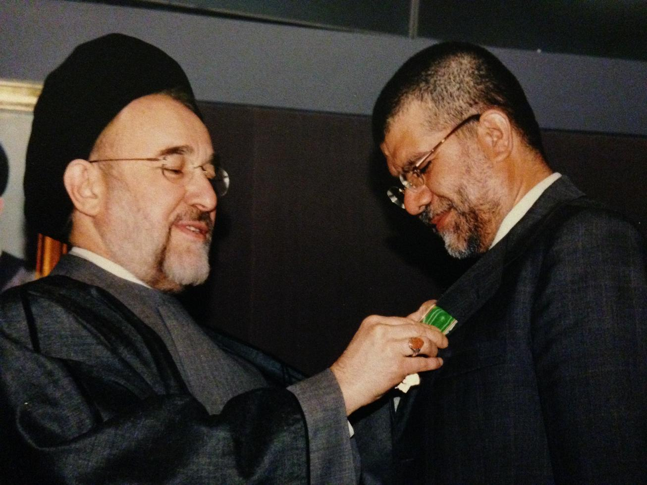 دریافت نشان دولتی لیاقت و مدیریت از جناب آقای دکتر خاتمی رییس جمهور دولت های هفتم و هشتم